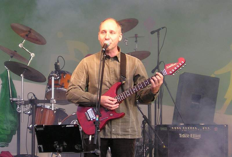 Jakub Sienkiewicz, koncert pod CH Arkadia w 2005 r.